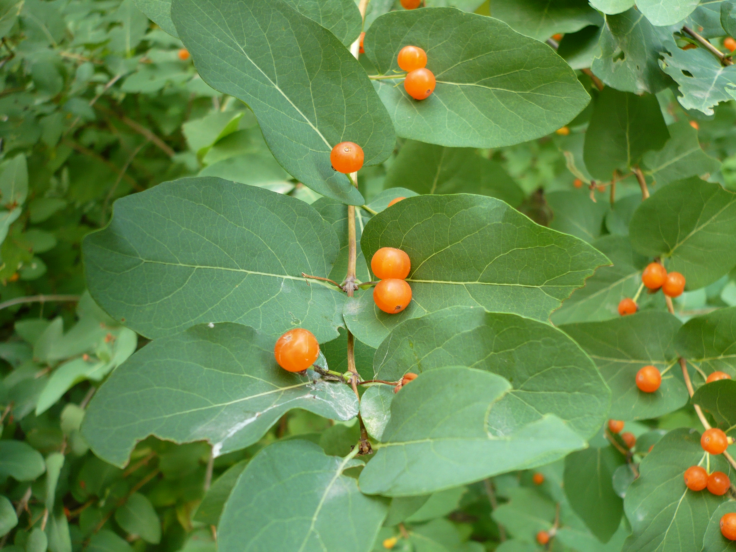 Жимолость татарская. Урочище Дворовое, Шебекинский район Белгородской области.